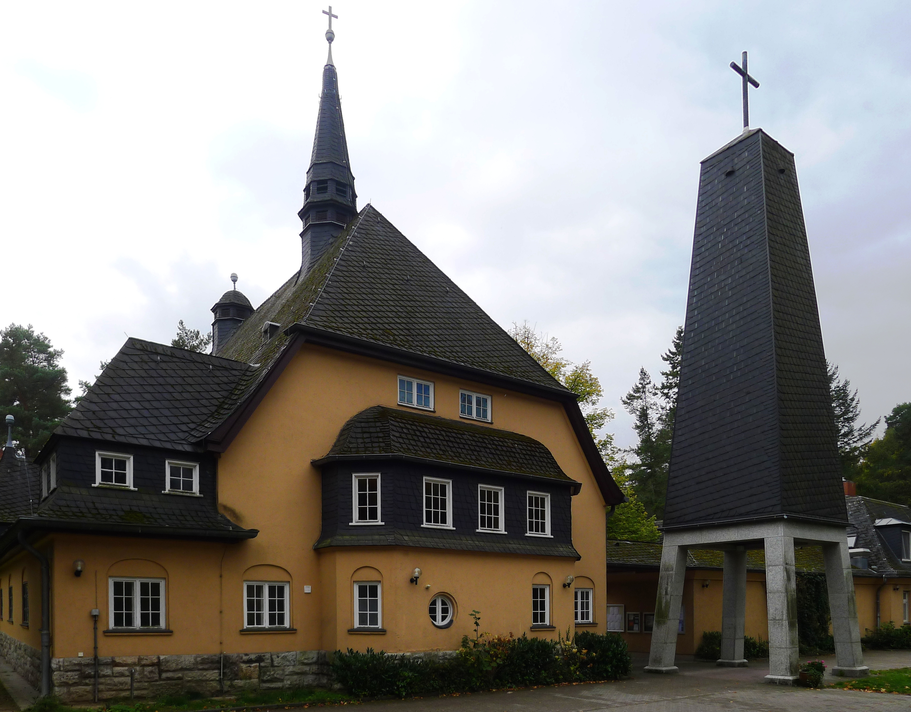 Blick auf St. Hildegard